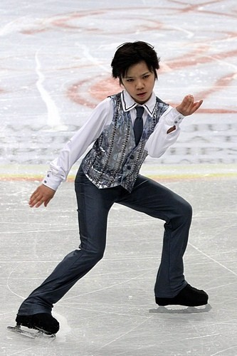 Сёма Уно (Япония) на чемпионате мира по фигурному катанию среди юниоров 2012